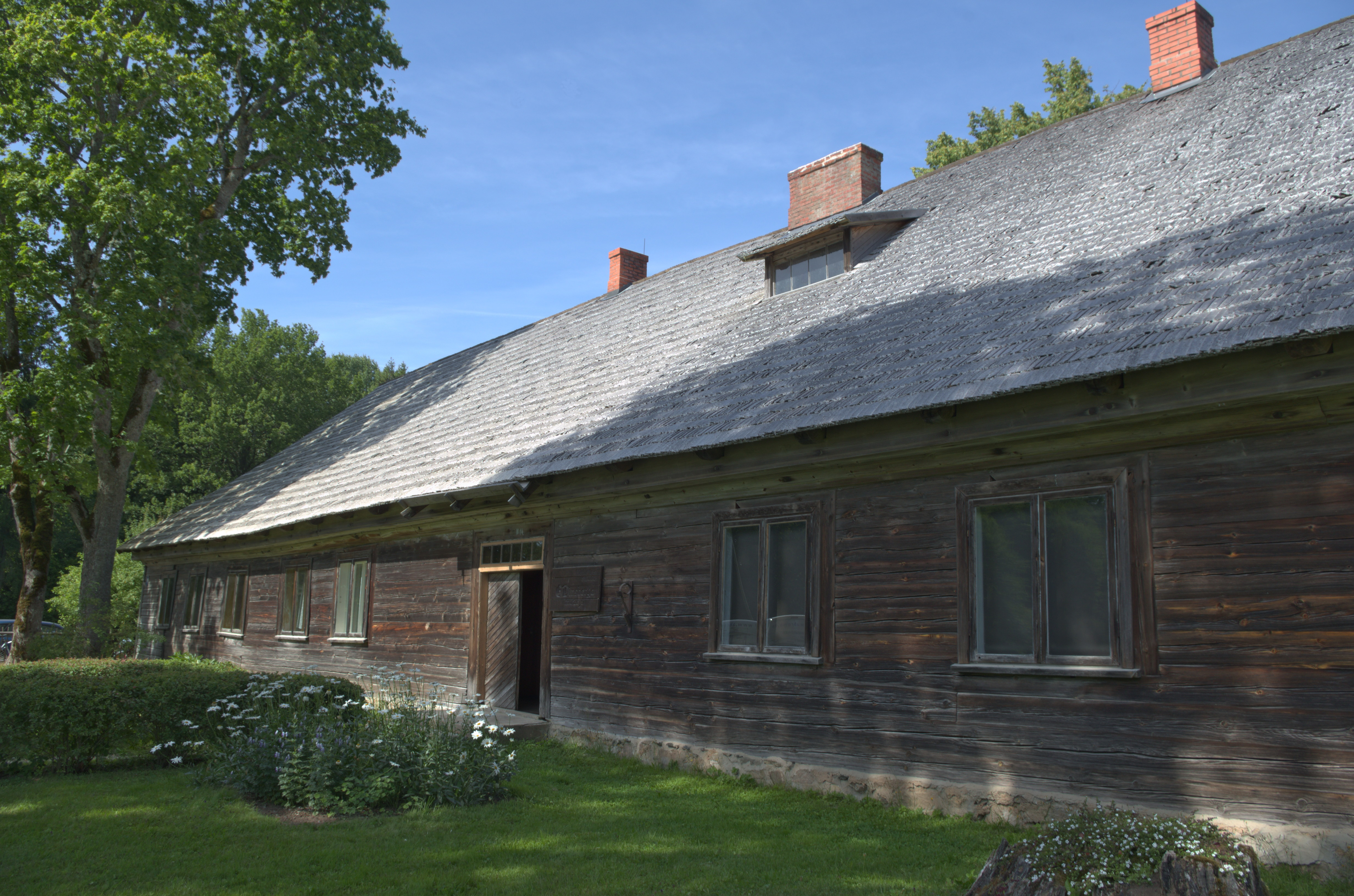 Kubeles (Kubalu) skola, Dundagas pagasts